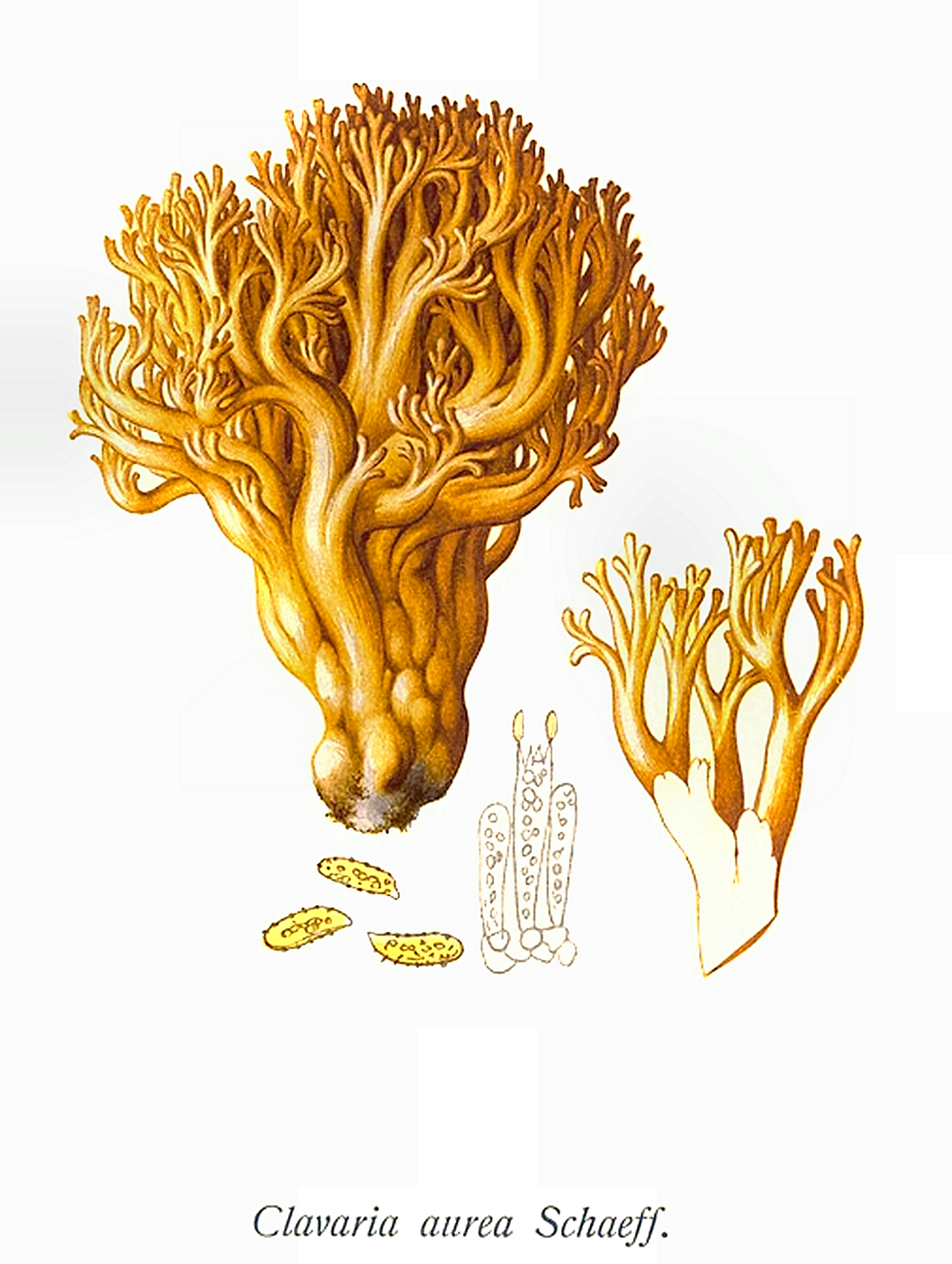 Giacomo Bresadola; Clavaria aurea Schaeff.